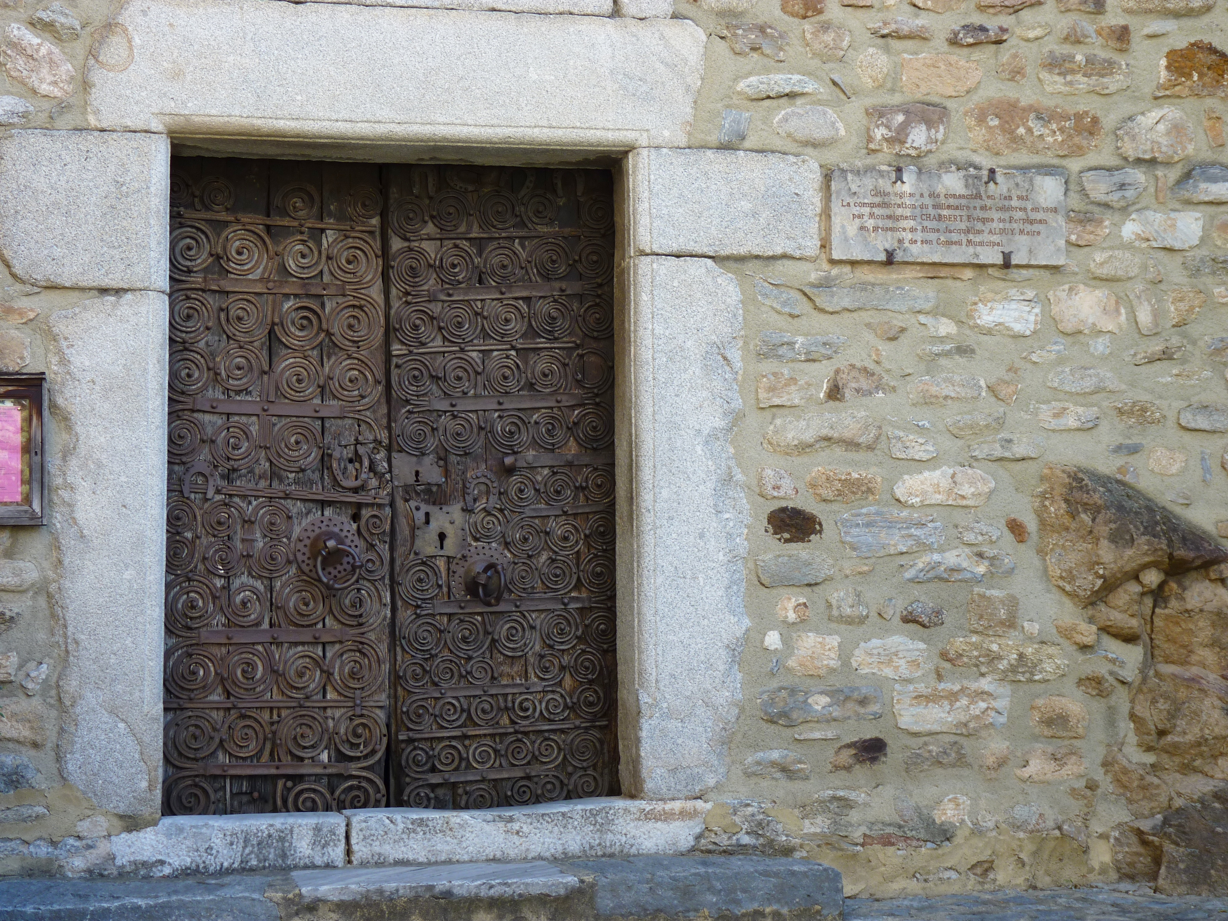 Entrée de l'église Saint-Martin de Palalda, Amélie-les-Bains-Palalda (Pyrénées-Orientales, Languedoc-Roussillon, France)